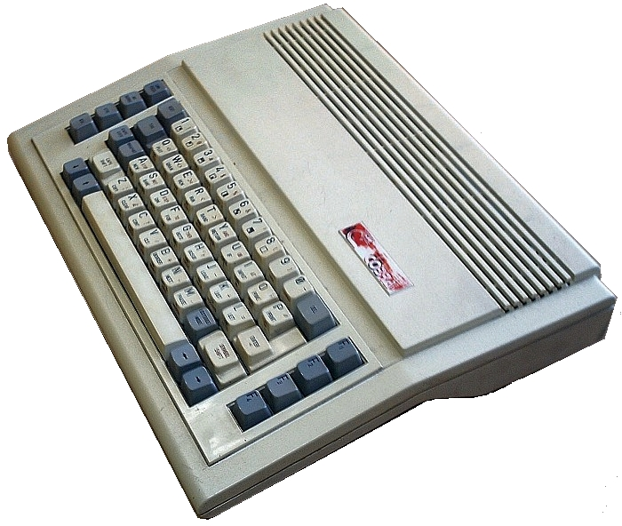 CoBra computer, made in Braşov, Romania (1987 - 1990)